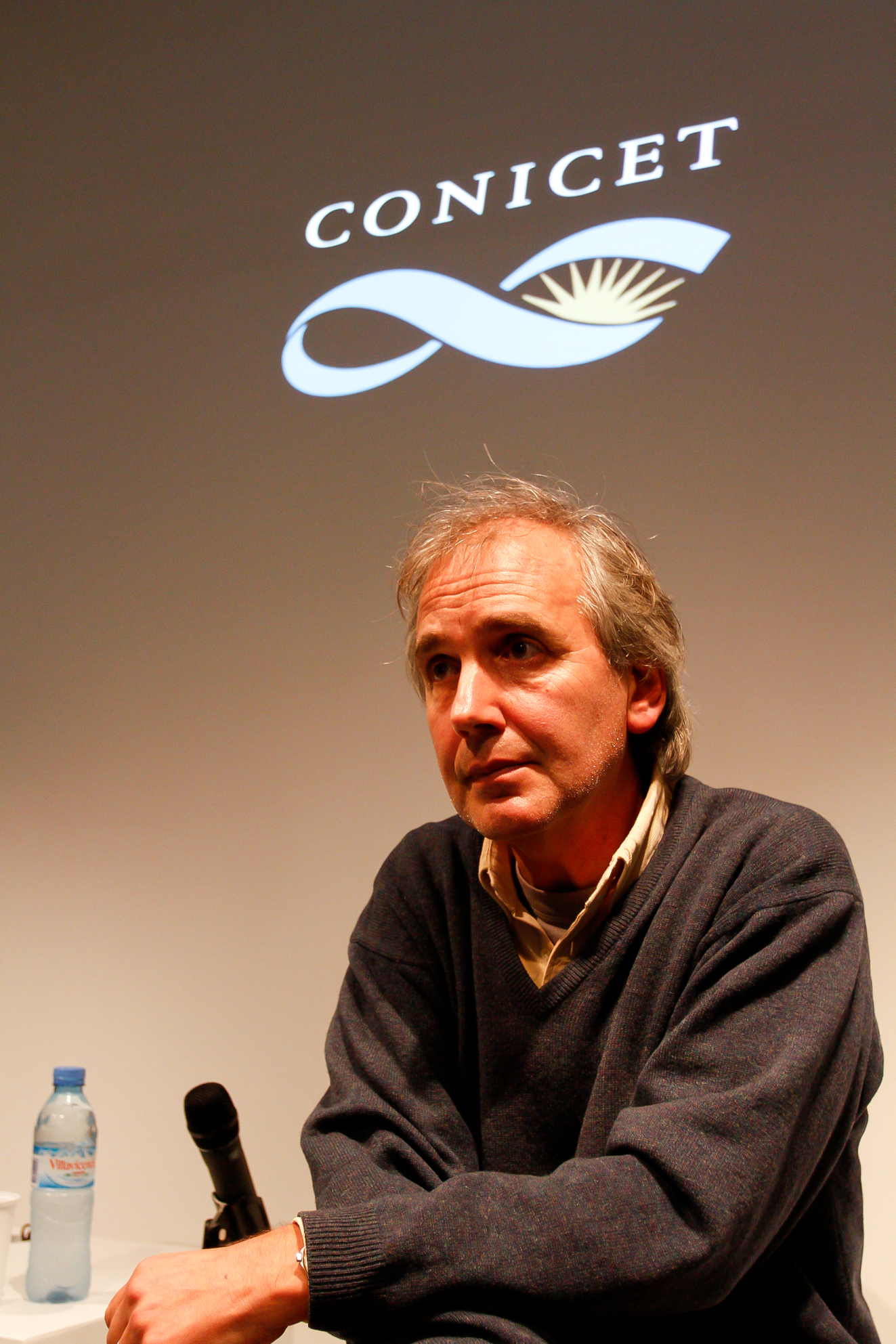 03 de Agosto de 2011. Charla cientifica "La aplicación de la bioquímica" brindada por Alberto Kornblihtt en el espacio del Conicet Ciencia 2.0. Fotos: Mariano Sandá/Tecnopolis.